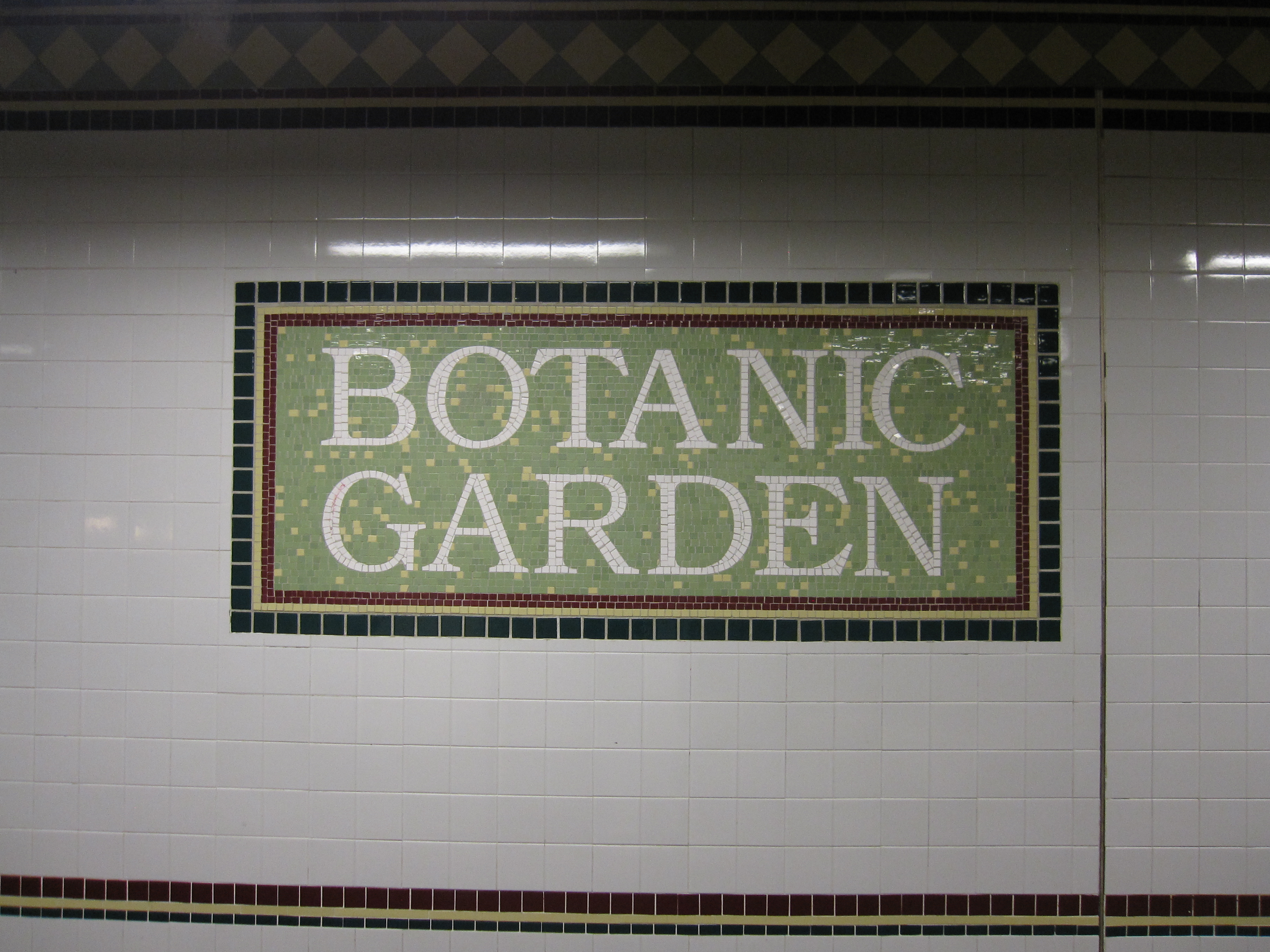 Botanic Garden (BMT Franklin Avenue Line)